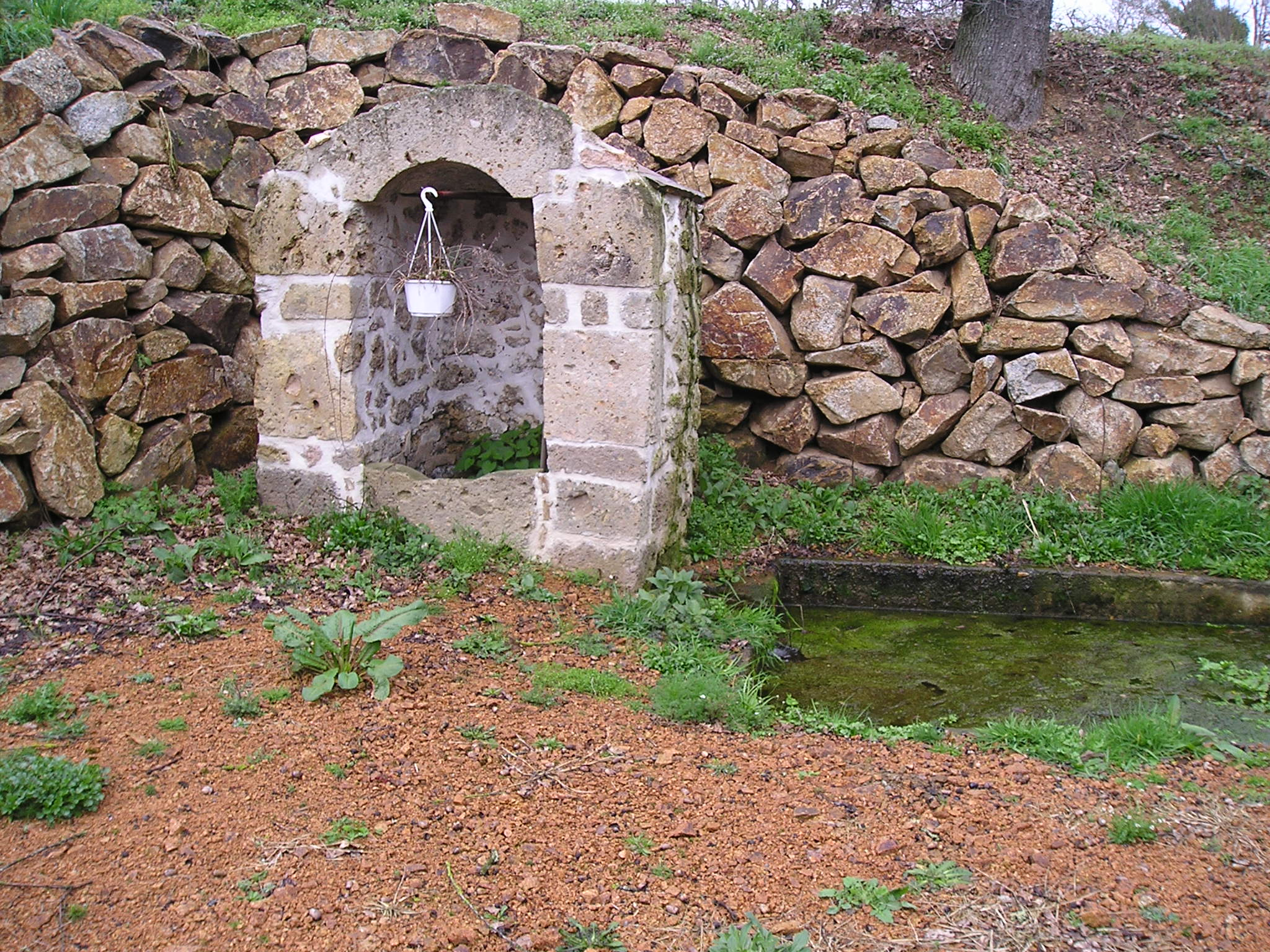 Fontaine des gouttes, Pressignac, Charente, France.